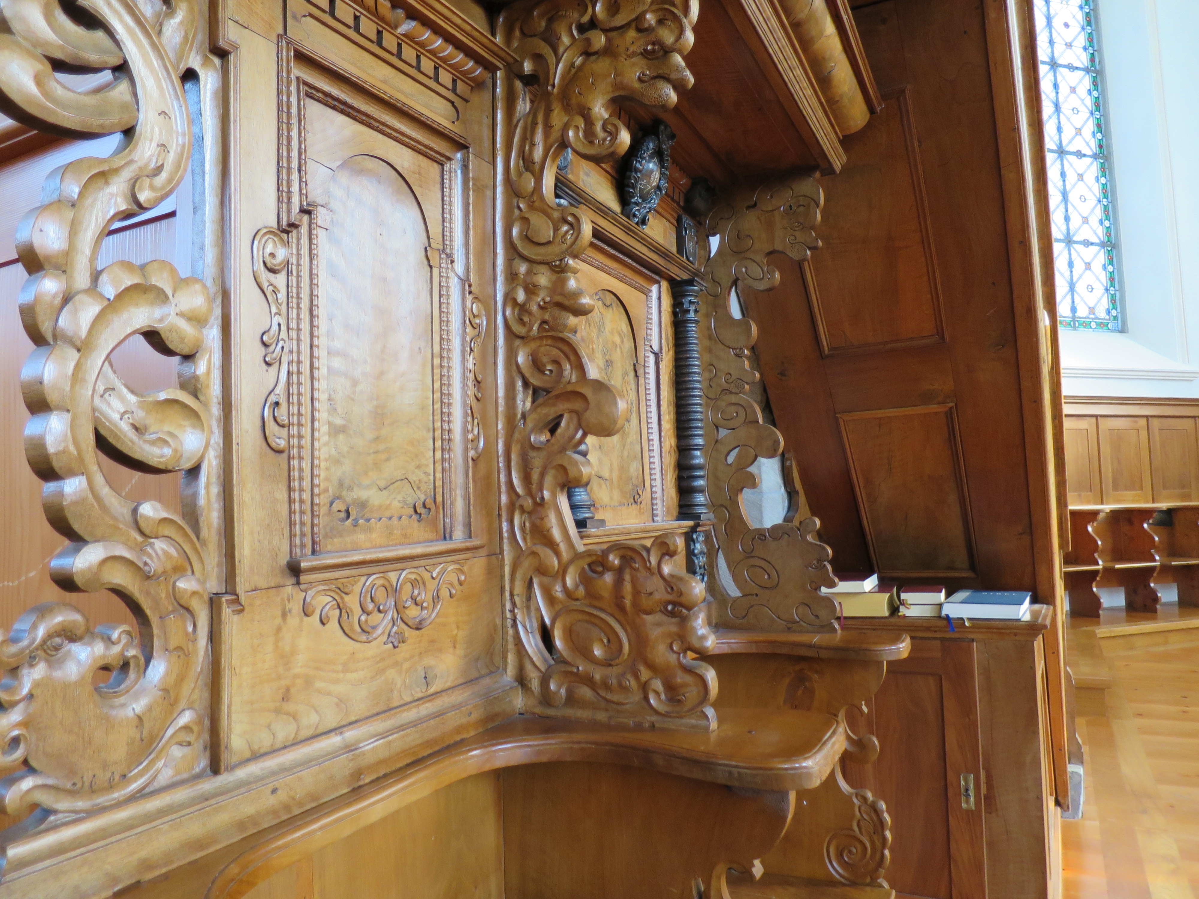 Der barocke Pfarrstuhl in der reformierten Kirche Hombrechtikon